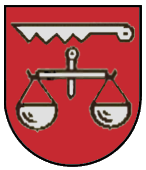 Wappen von Zwiefaltendorf in der Stadt Riedlingen, Baden-Württemberg